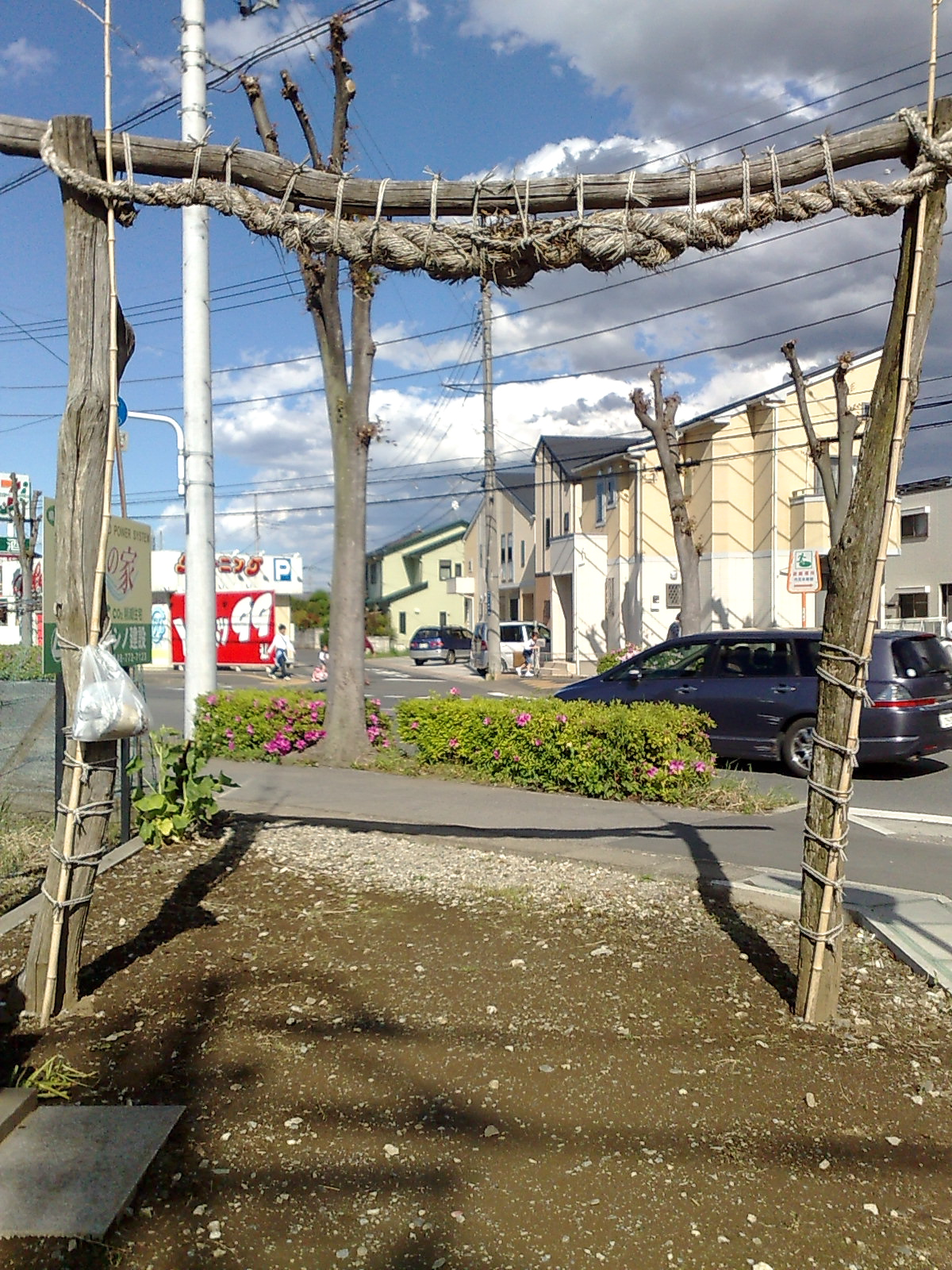 Kawa, Ageo, Saitama Prefecture 362-0048, Japan